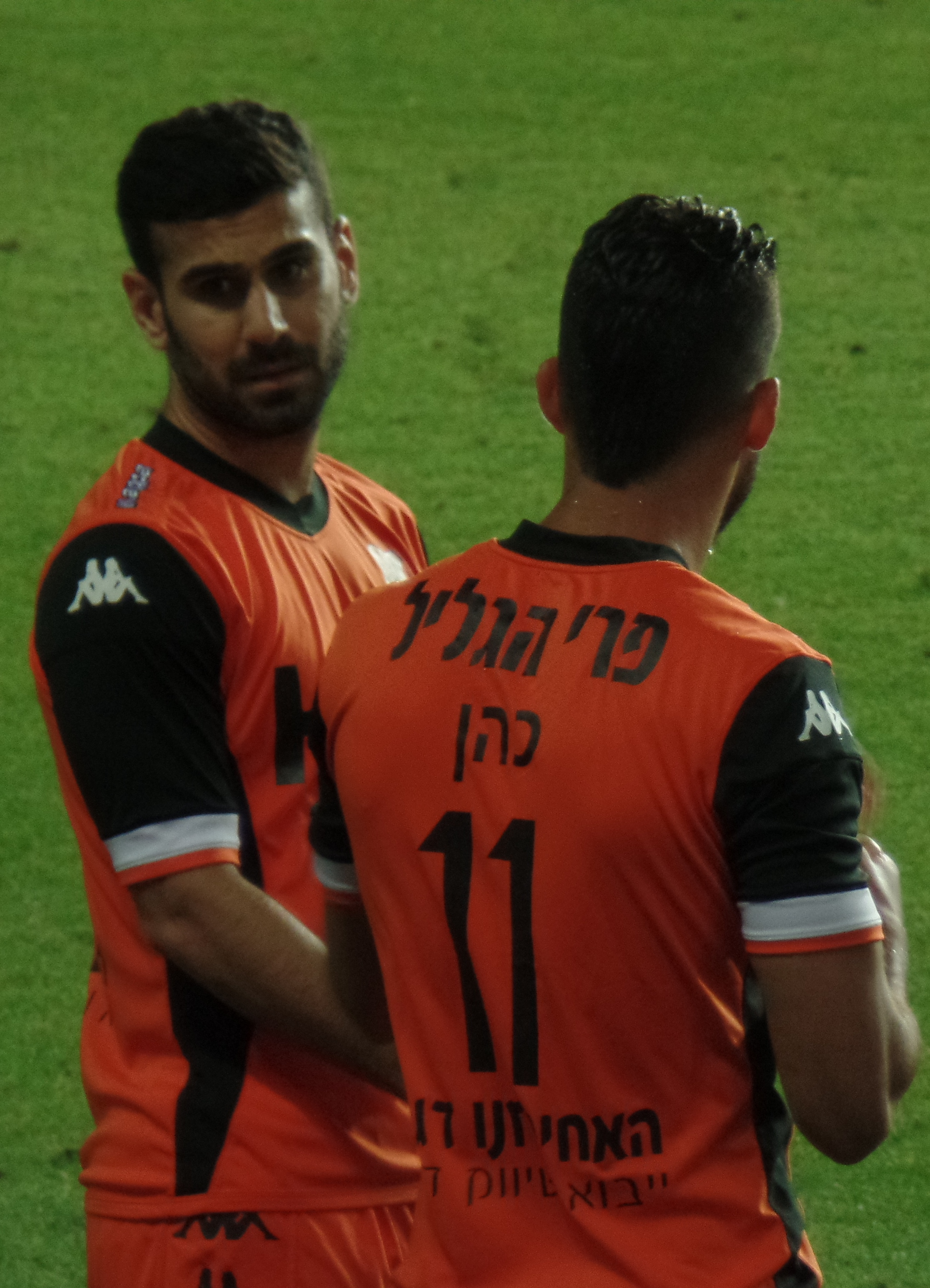 רועי גורדנה, 2018